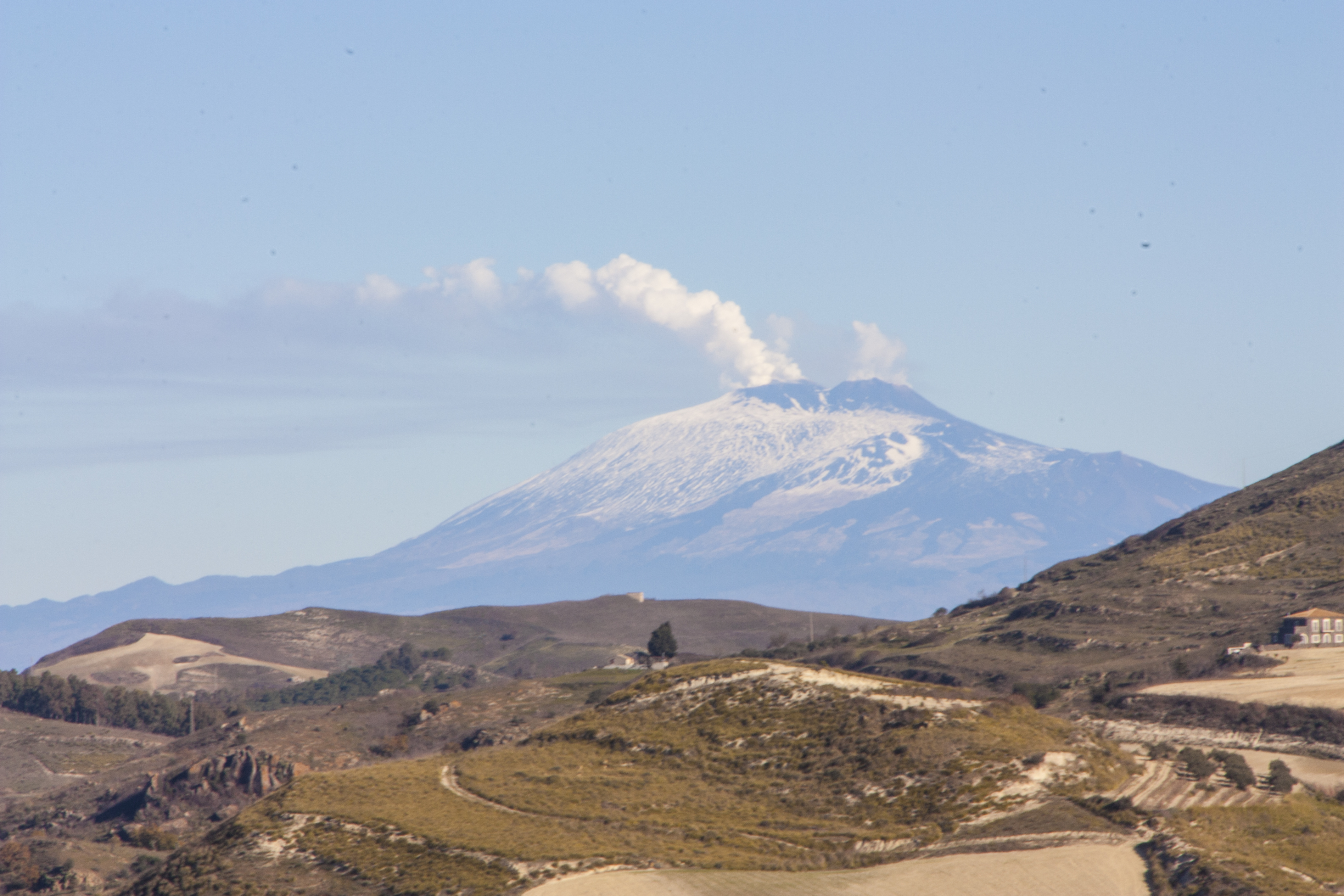 Etna from Licodia Eubea